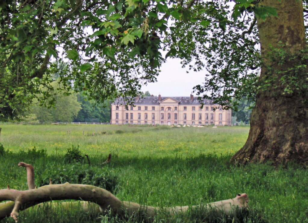 Château de Marmousse (commune de Garnay, Eure-et-Loir) Photo JH Mora, mai 2005